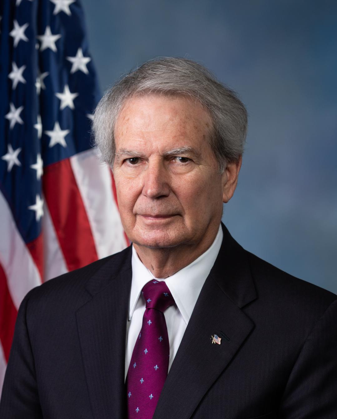 U. S. Rep Walter Jones in December 2017